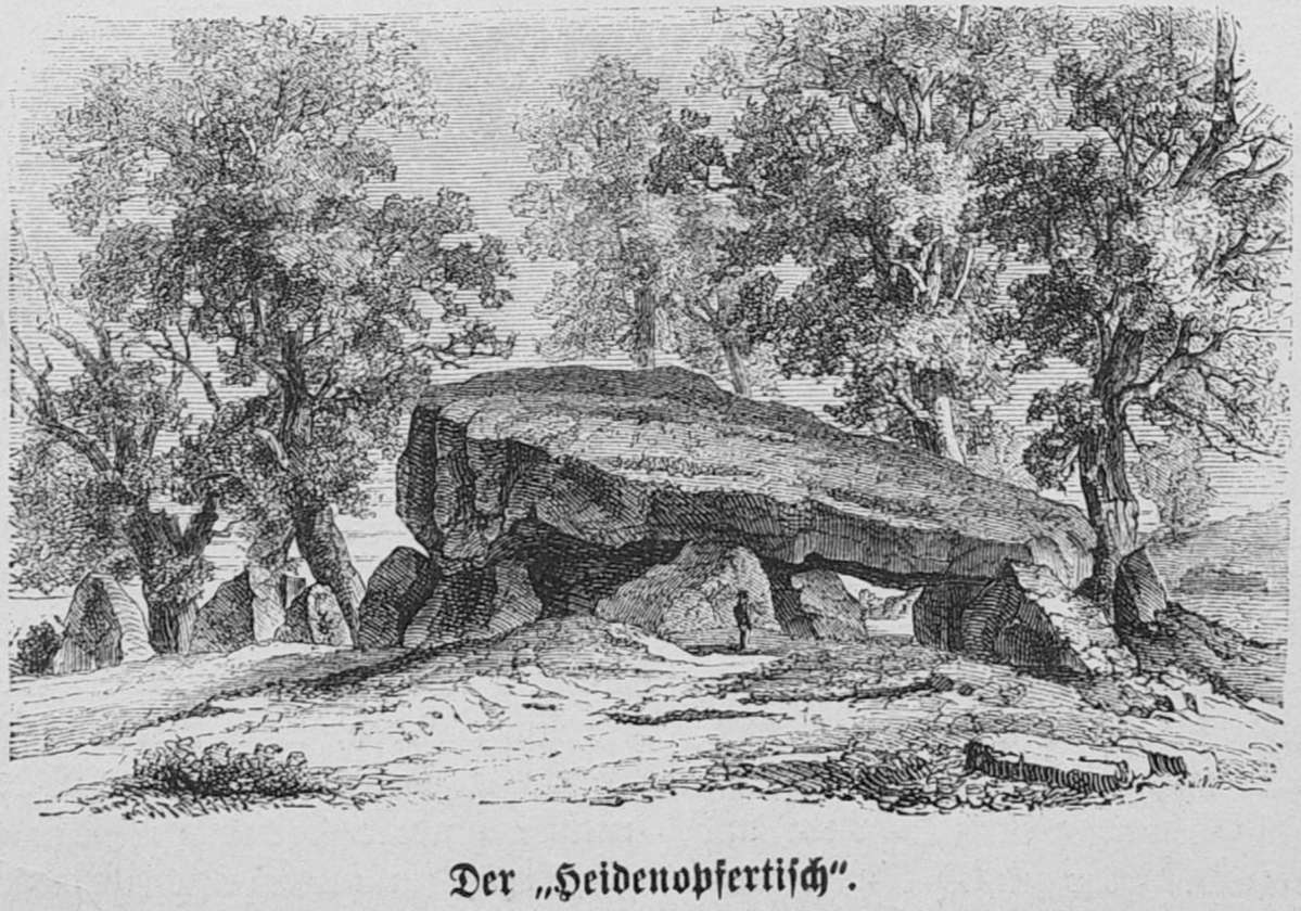 Illustration zum Artikel: Hünensteine im Oldenburgischen, Die Gartenlaube 1879